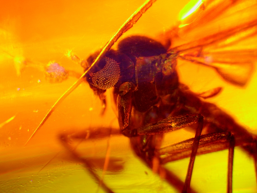 Muchówka sprzed 50 milionów lat zatopiona w bałtyckim bursztynie